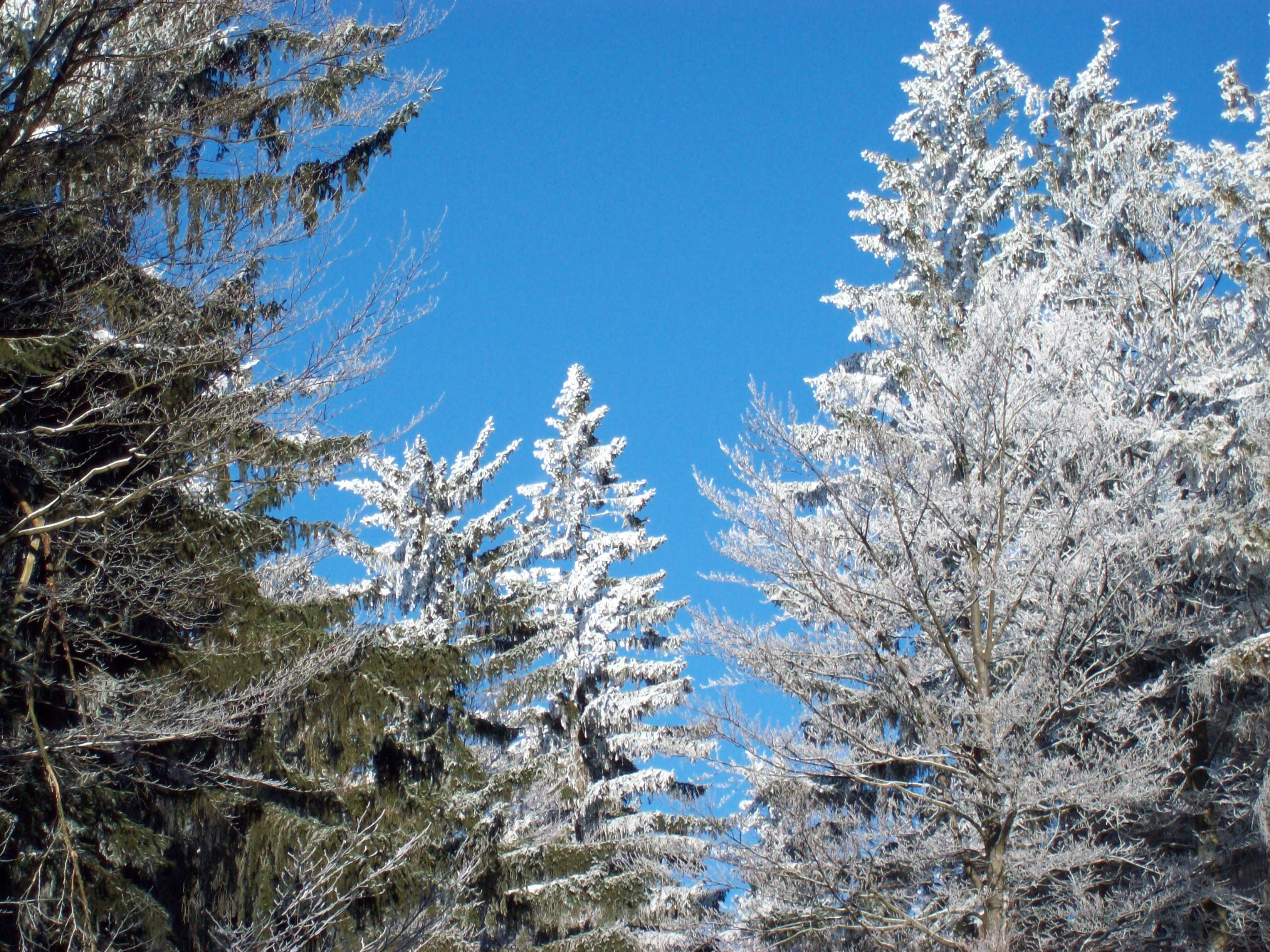 Winterliche Impressionen am Haidel